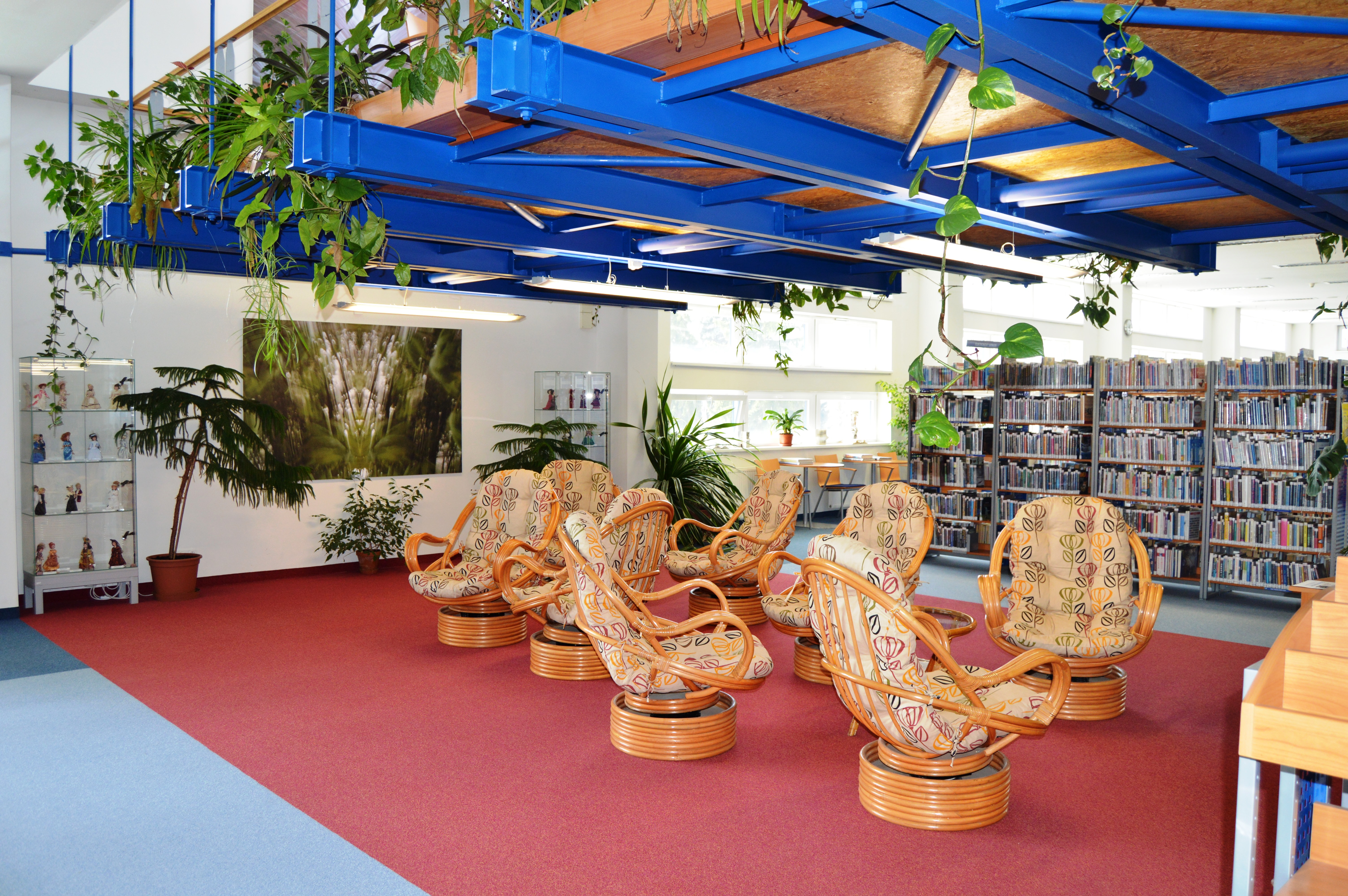 Odpočinková a studijní zóna v oddělení pro dospělé čtenáře, prostor slouží mimo jiné k pořádání nejrůznějších výstav.